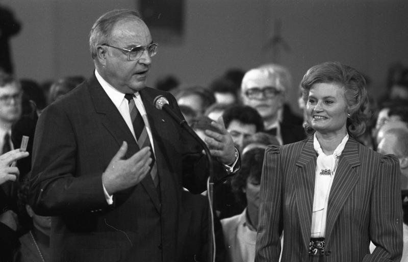 25.1.1987 Wahlparty der CDU im Konrad-Adenauer-Haus Interviews mit Bundeskanzler Helmut Kohl und Heiner Geißler